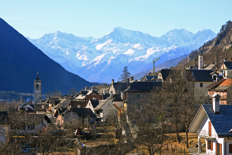 Veduta di Villette (VB) da est. Sullo sfondo il Pizzo d'Andolla, e le vette del Weissmies, Lagginhorn e Fletschhorn.